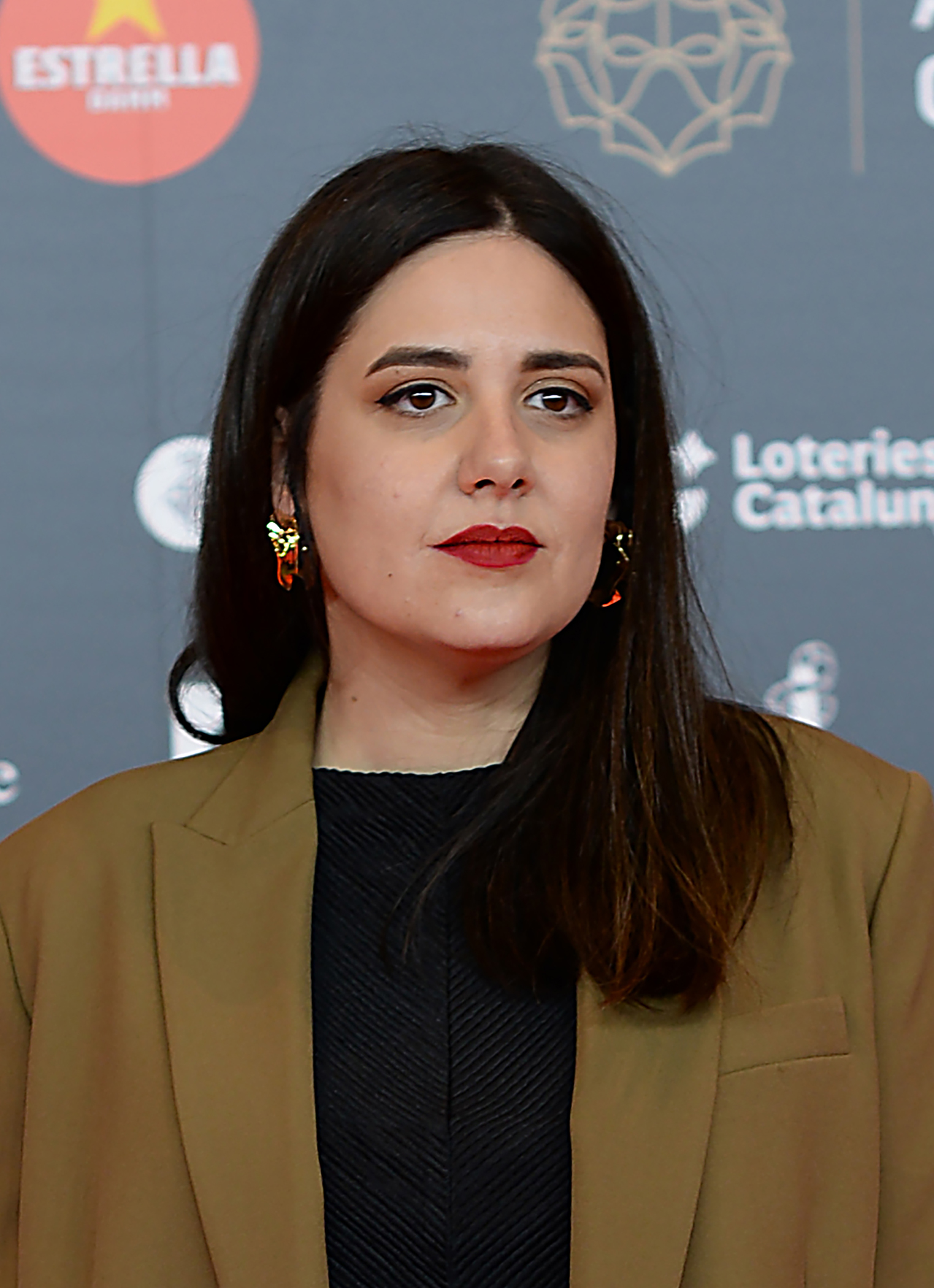 Belén Funes, directora de cinema, XII Premis Gaudí (2020)